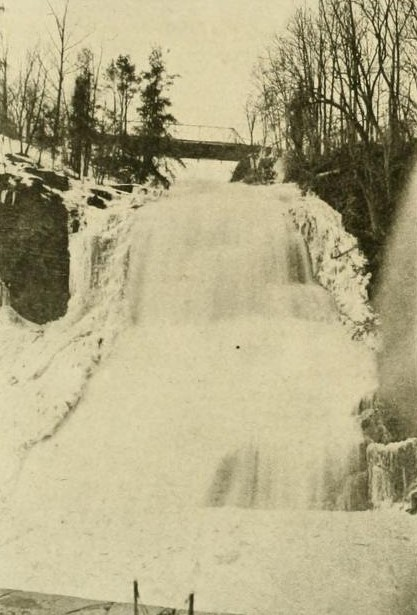 Elmira and Seneca Lake Railway - Montour Wasserfälle